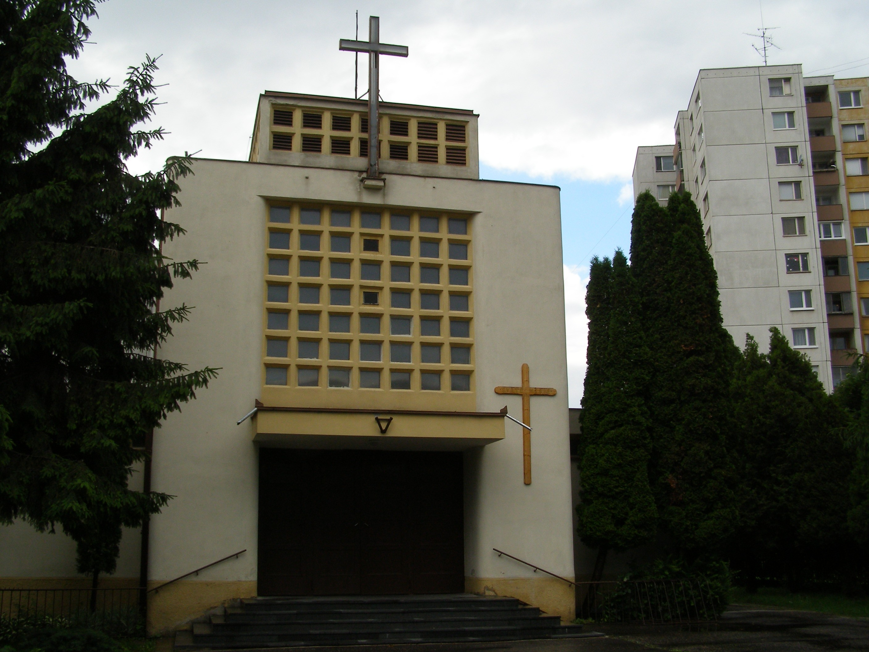 Roman Catholic church "Kostol povýšenia svätého Kríža", Daliborovo námestie, Petržalka, Bratislava, Slovakia